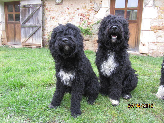 Francuskie Barbety